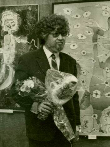 Фотография художника Сакена Гумарова на выставке в Государственном Музее Истории Украины в 1991 году